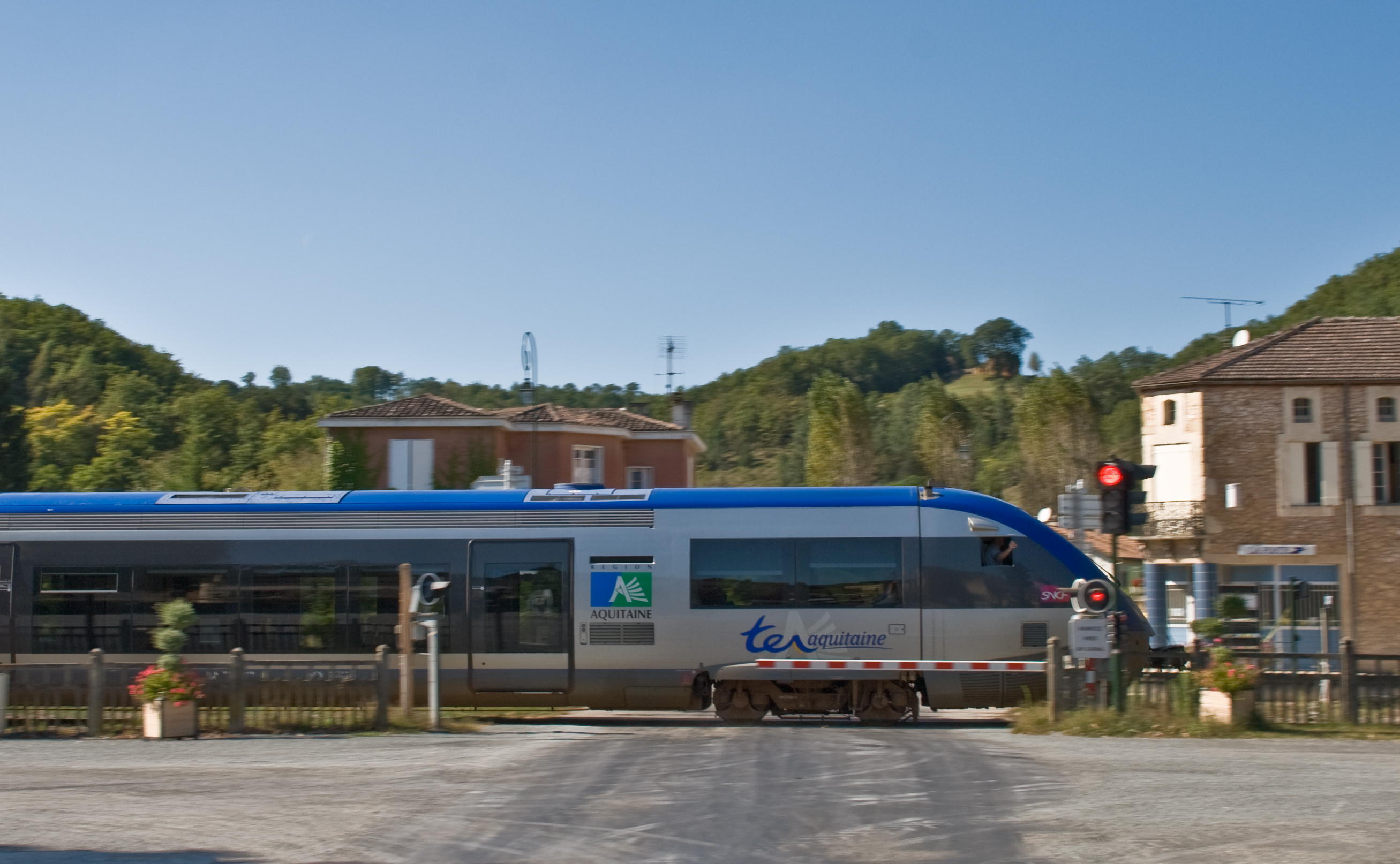 TER Aquitaine dans le Lot-en-Garonne